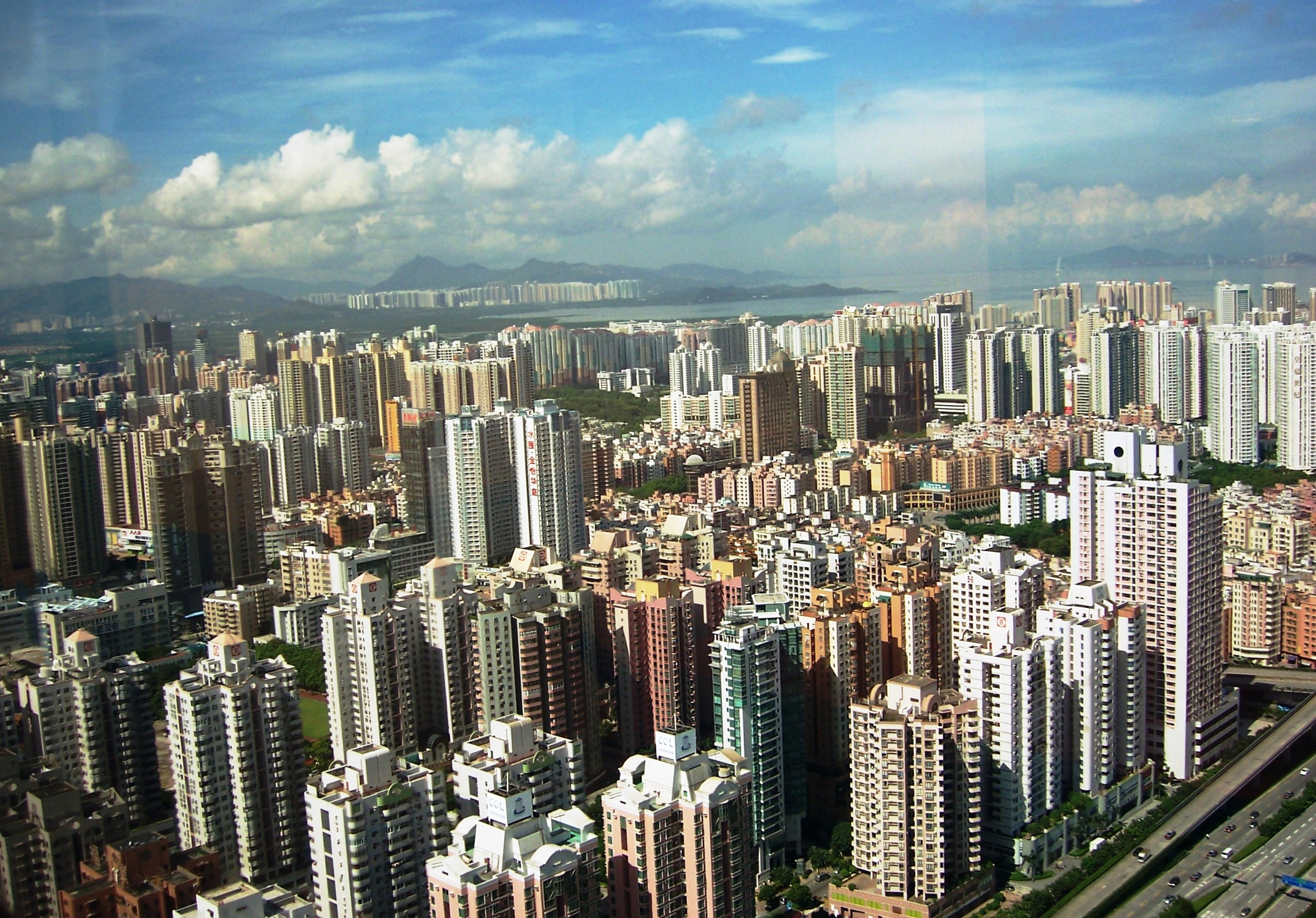 深圳市，远处为大海